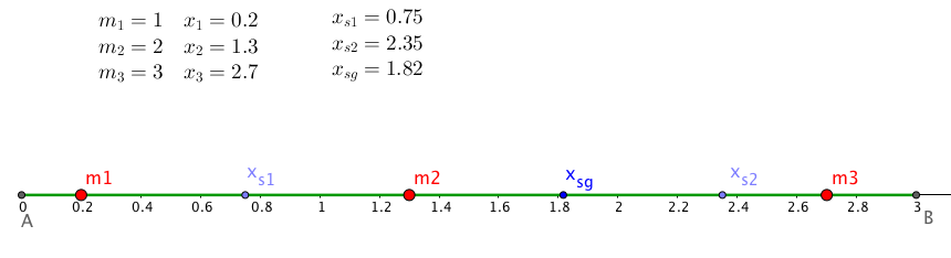 Massenschwerpunkt